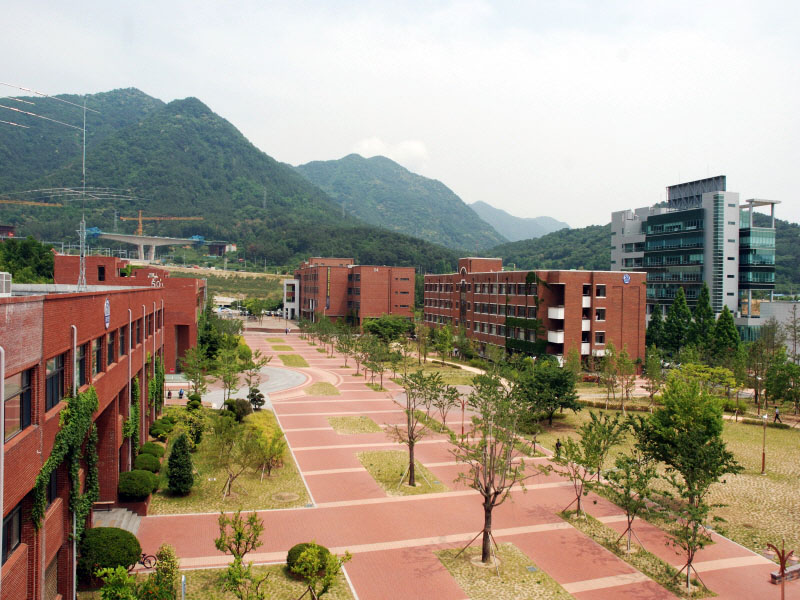 창원대학교 공대 건물군 사진입니다.